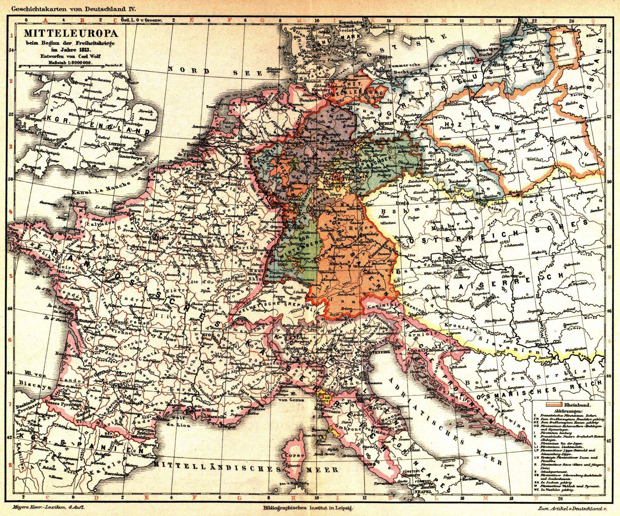 Karte von Mitteleuropa vor den Befreiungskriegen 1813